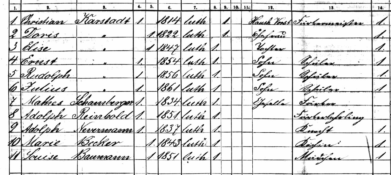 Ausschnitt der Volkszählungskarte Grevesmühlen, Wismarsche Straße Nr. 278, vom 3. Dezember 1867. Es ist das Wohn- und Elternhaus von Rudolph Karstadt, späterer Gründer der Karstadt-Kaufhäuser.